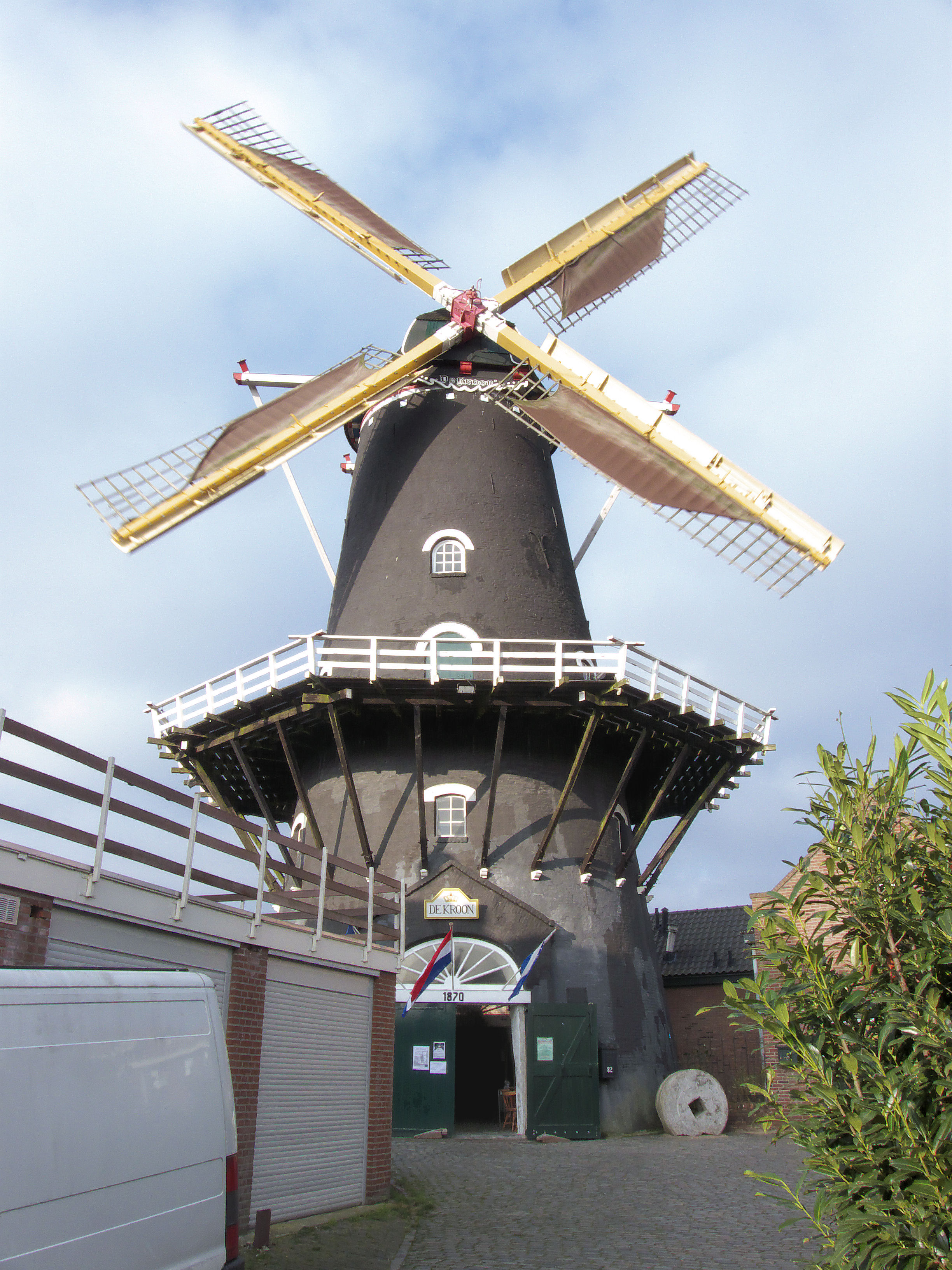 Molen De Kroon Arnhem